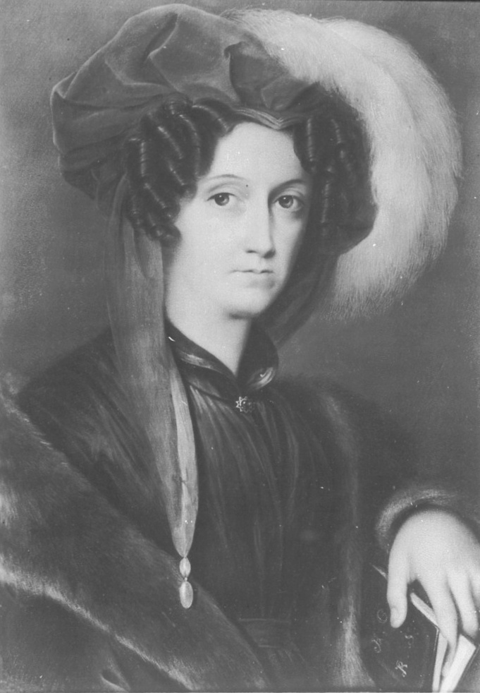 Auguste Charlotte von Kielmannsegge (1777–1863), Öl auf Elfenbein. Lübbenau im Spreewald, Spreewaldmuseum Lübbenau-Lehde